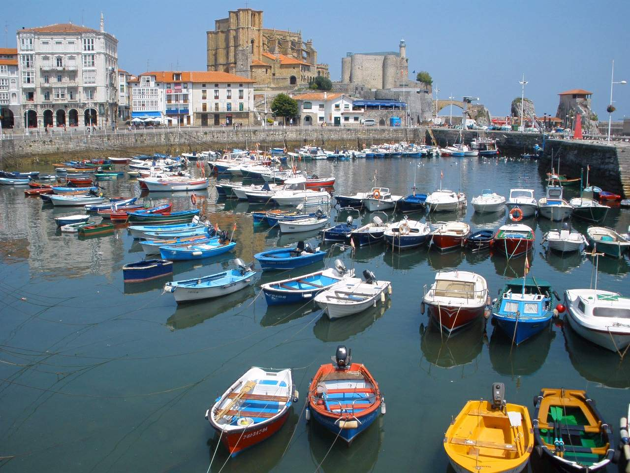 Puerto de Castro Urdiales